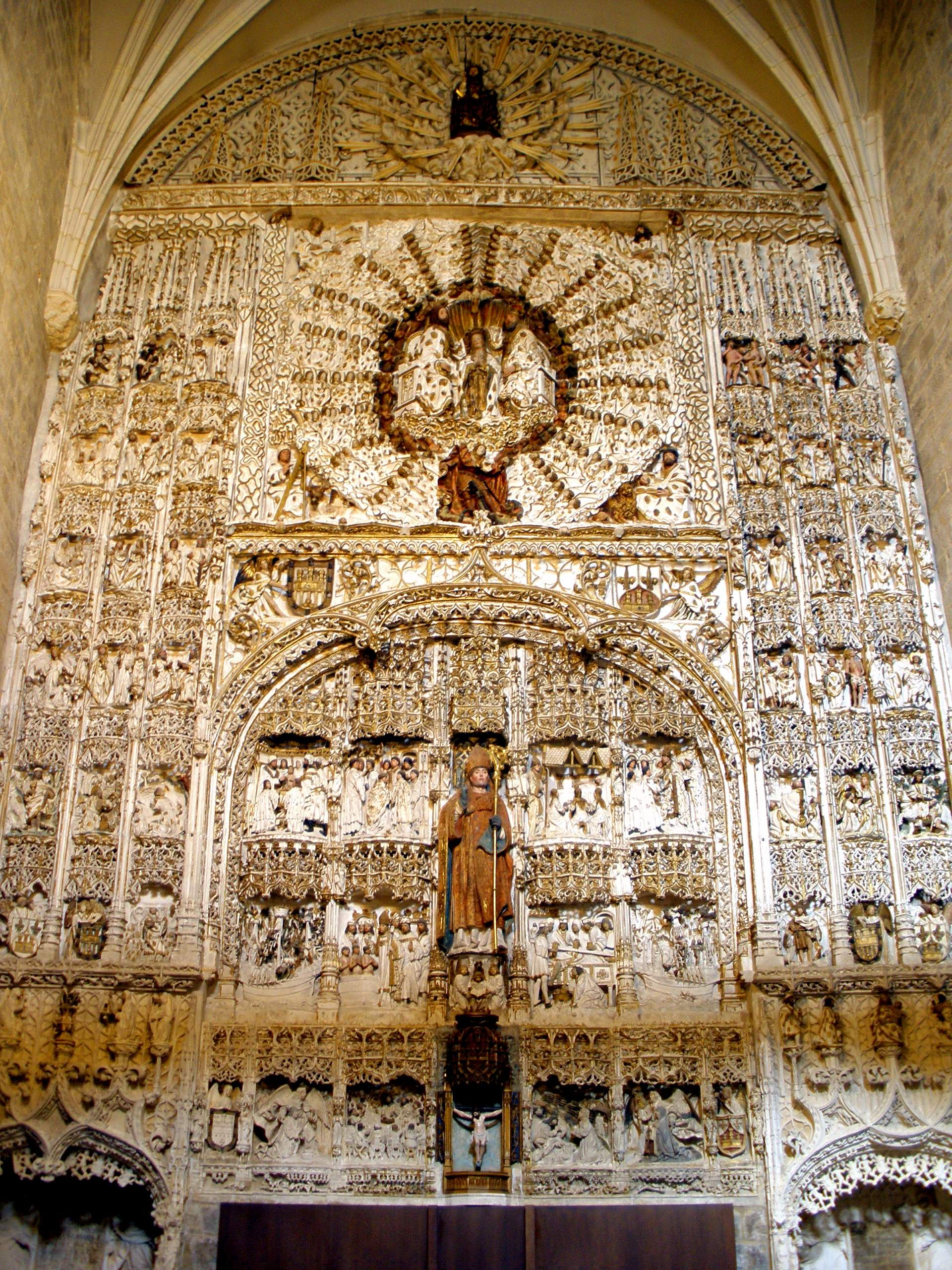 El retablo mayor de la iglesia de San Nicolás de Bari (Burgos), tras la restauración integral del templo acometida en 2008-2009